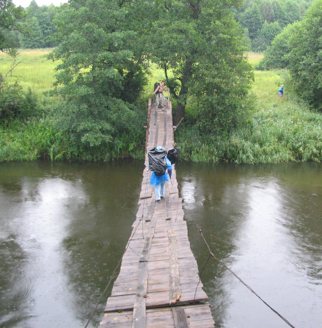 Tiltas per Merkį ties Mardasavo kaimu. Nuotrauka naudojama su autoriaus (Laiqua) leidimu.